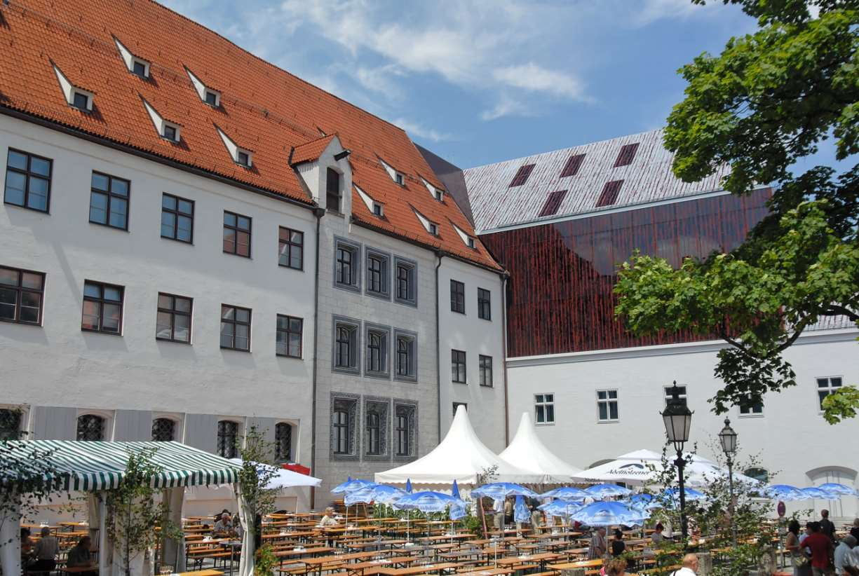 AlterHof, Lorenzistock und Zwingerstock